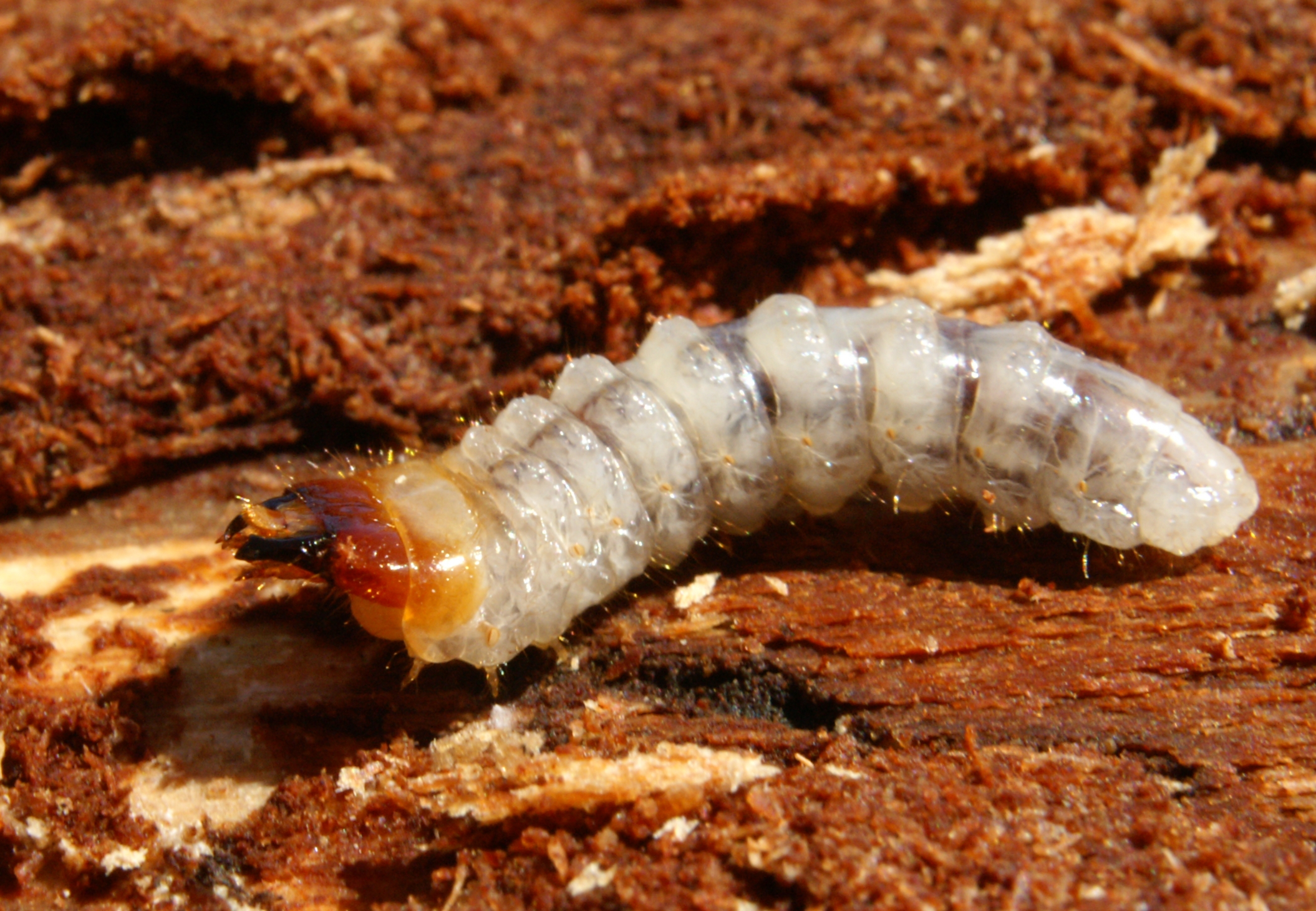 Bockkäferlarve (subfamily Lepturinae)